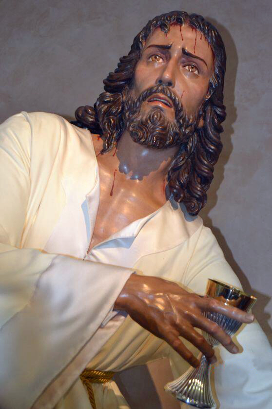 Ntro.-Padre-Jesús-de-las-Tres-Caídas-Dos-Hermanas